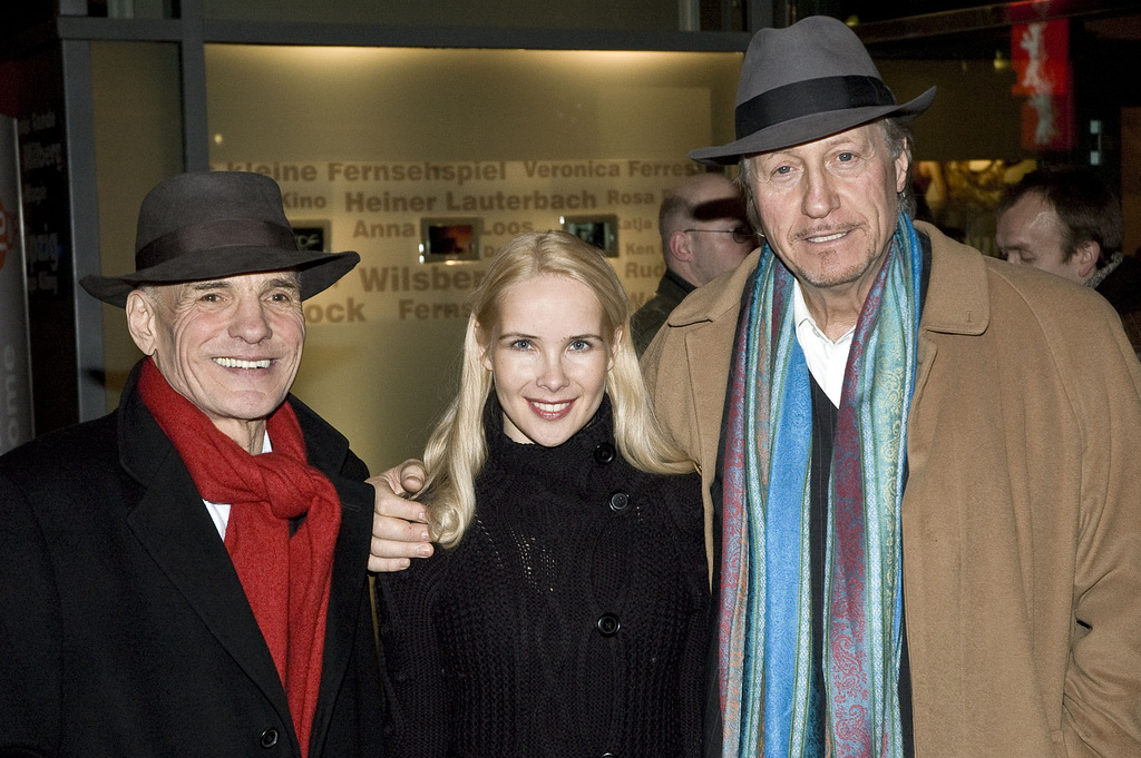 vlnr: Hans-Peter Hallwachs, Sylvia Leifheit, Reiner Schöne